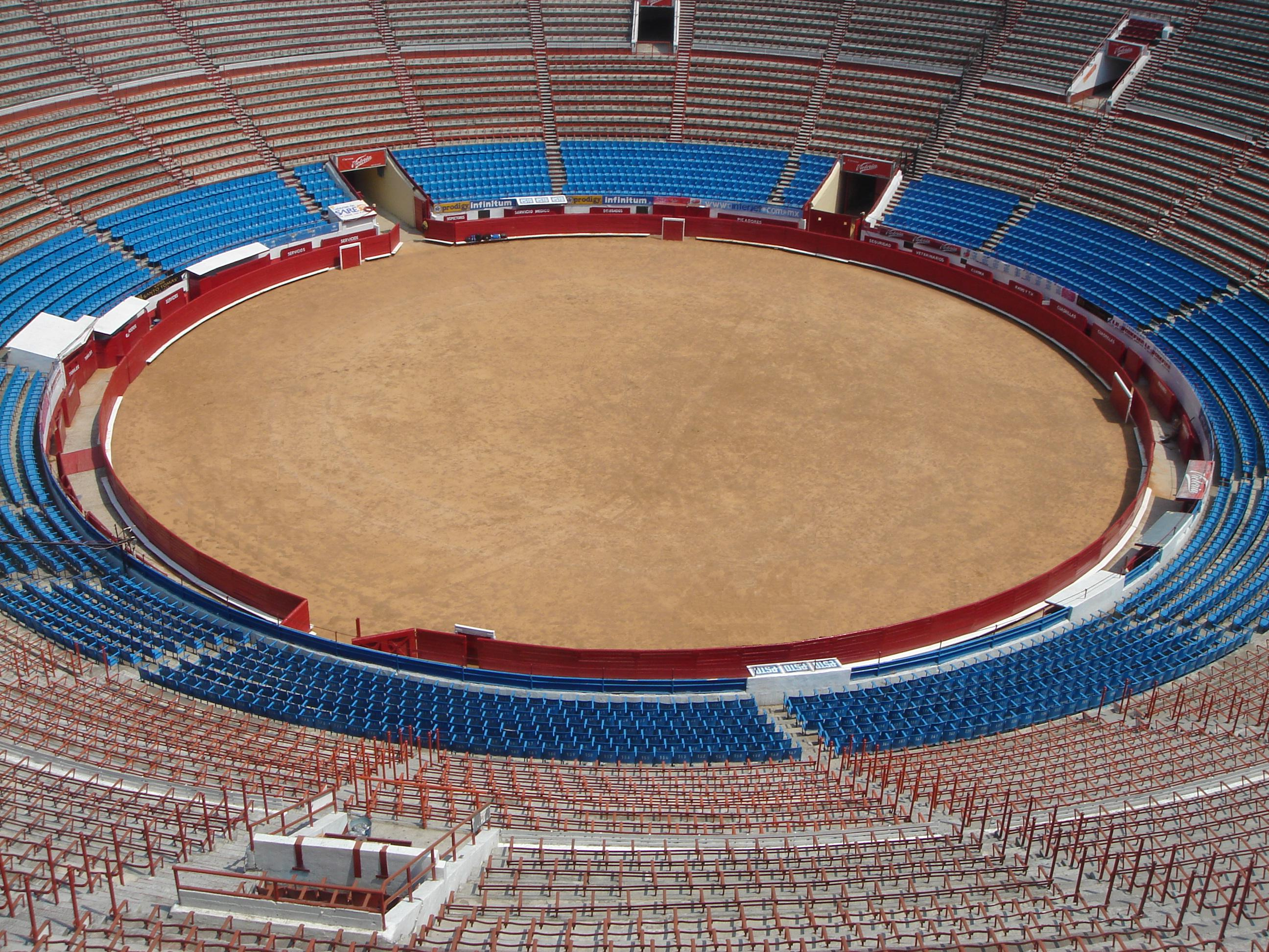 Monumental Plaza de toros México